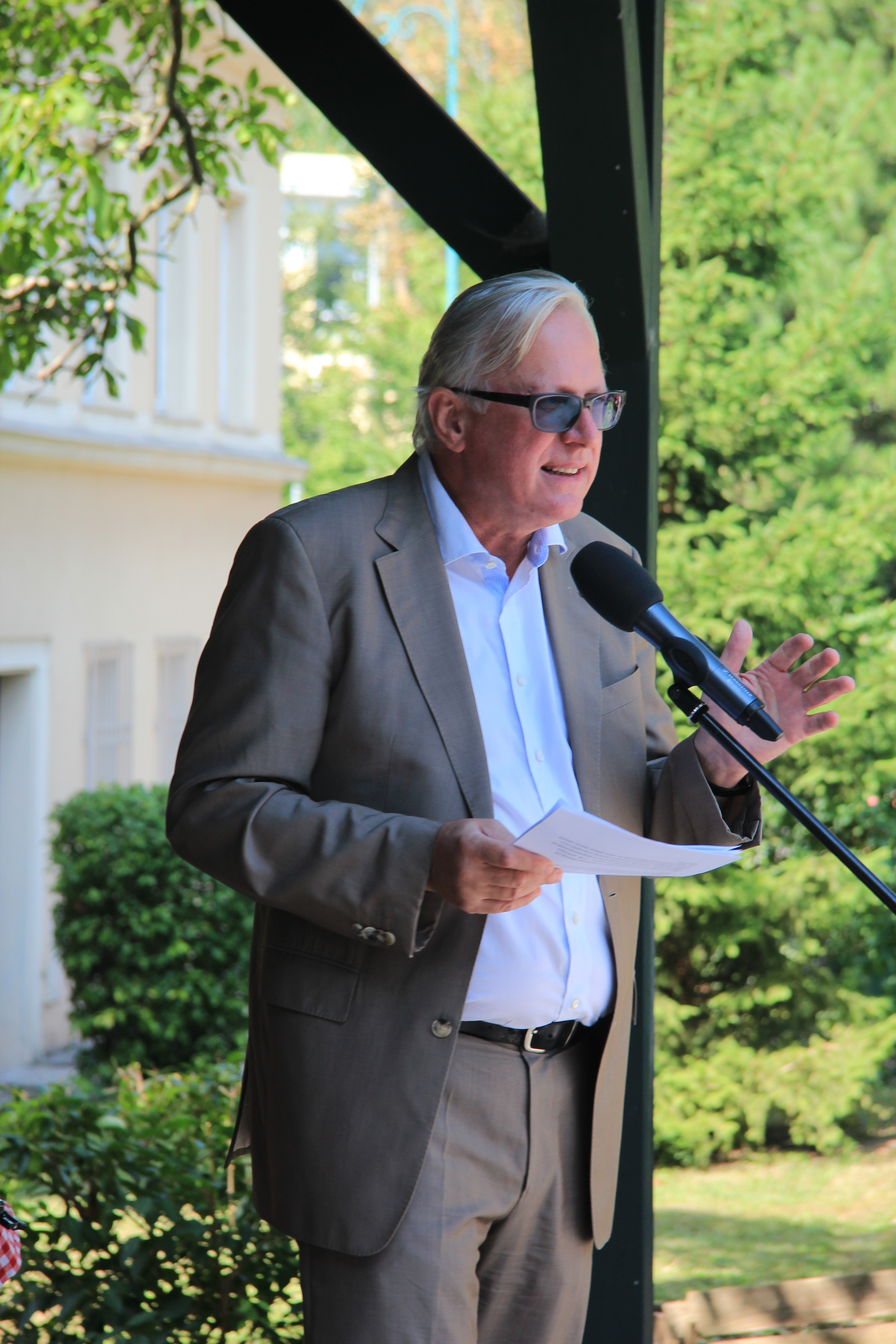 Carl Aigner, anläßlich einer Gedenkfeier 150 Jahre Waldmüller in der Hinterbrühl Personality rights warningAlthough this work is freely licensed or in the public domain, the person(s) shown may have rights that legally restrict certain re-uses unless those depicted consent to such uses. In these cases, a model release or other evidence of consent could protect you from infringement claims.